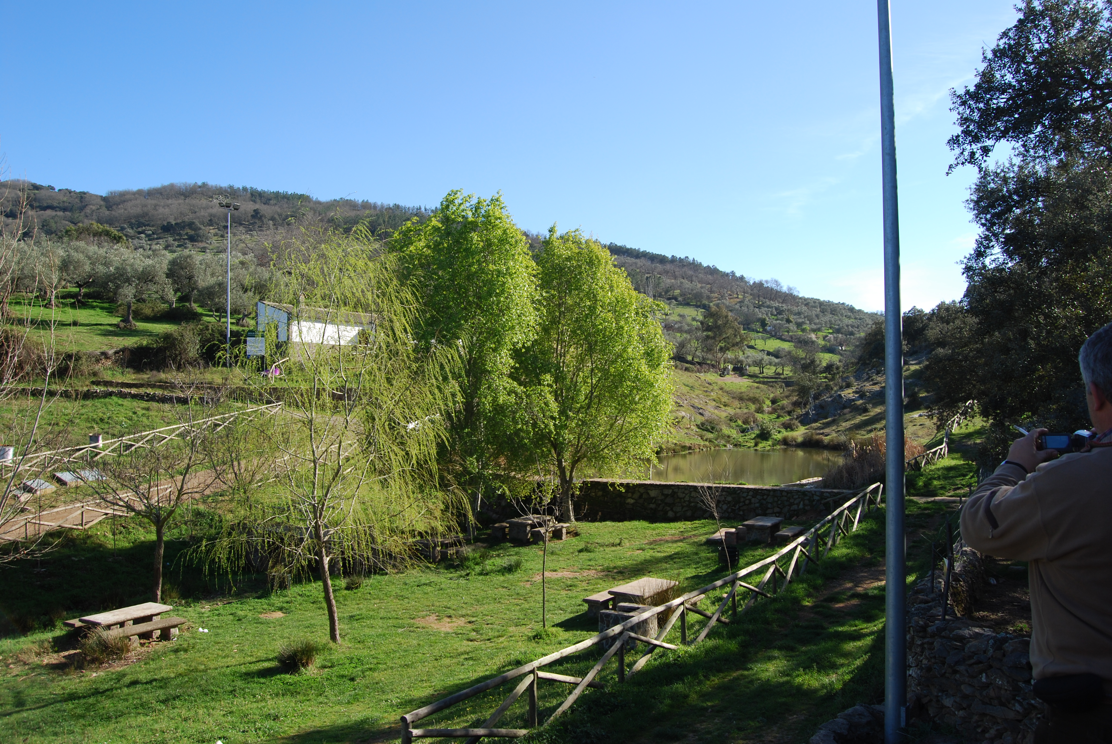 Merendero y charca natural de la Pisá del Caballo